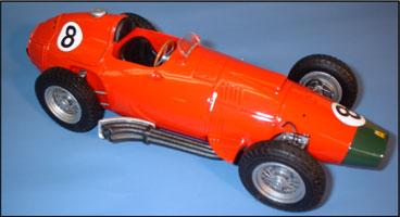 Ferrari 801 modèle réduit